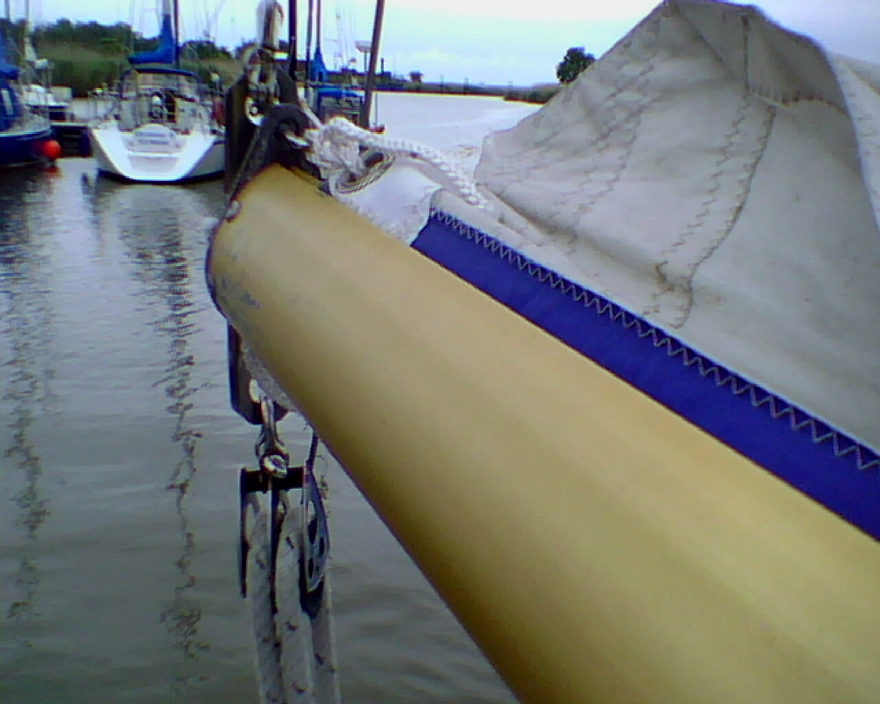 Baumnock